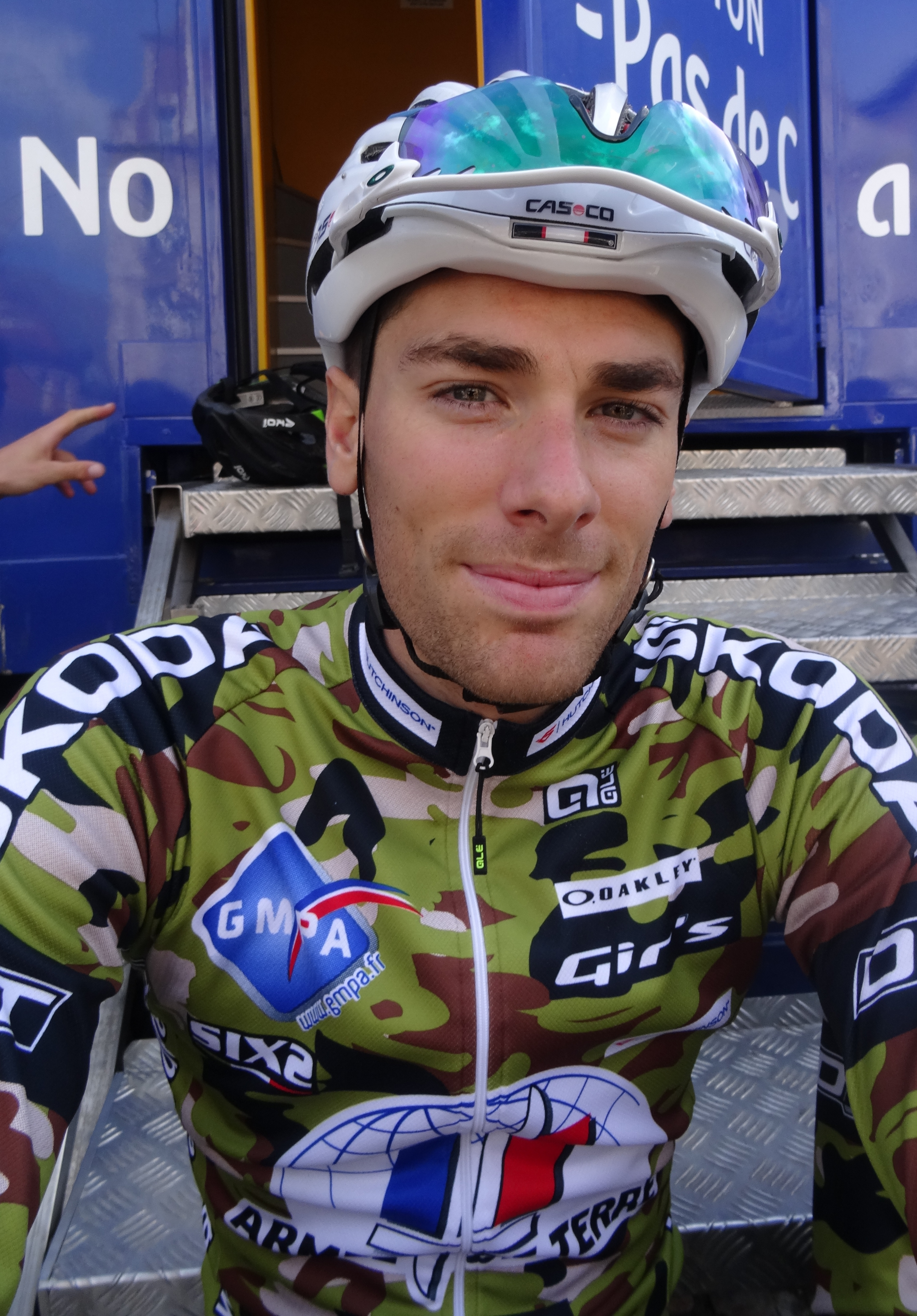 Reportage photographique réalisé le dimanche 25 mai 2014 à l'occasion du départ et de l'arrivée de la troisième étape du Paris-Arras Tour 2014 à Arras, Pas-de-Calais, Nord-Pas-de-Calais, France. Depicted person: Yann Guyot